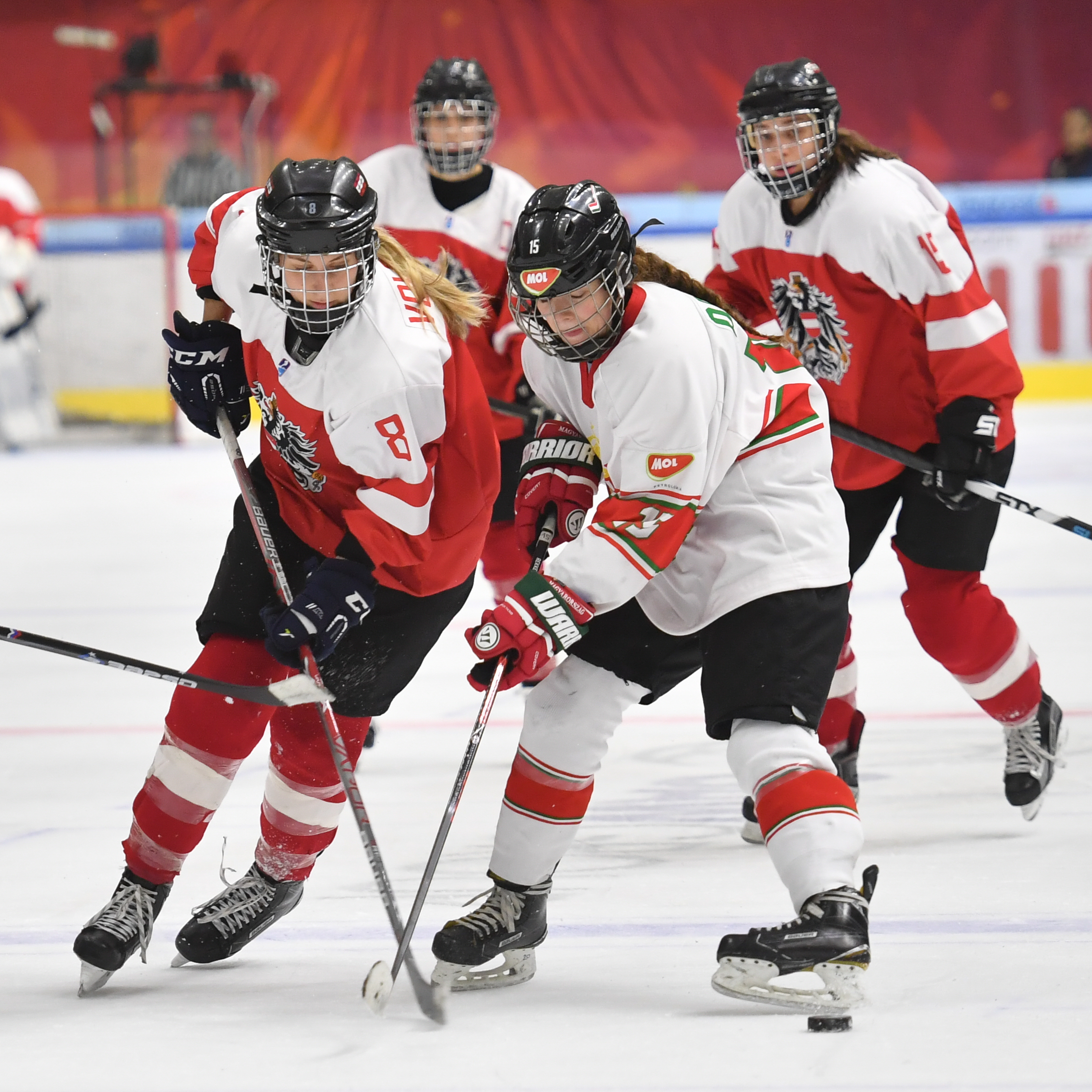 IIHF Eishockey Damen Weltmeisterschaft Division IA am 16. April 2017 in Graz.Bild zeigt Sophia VOLGGER (AUT) und Reka DABASI (HUN).